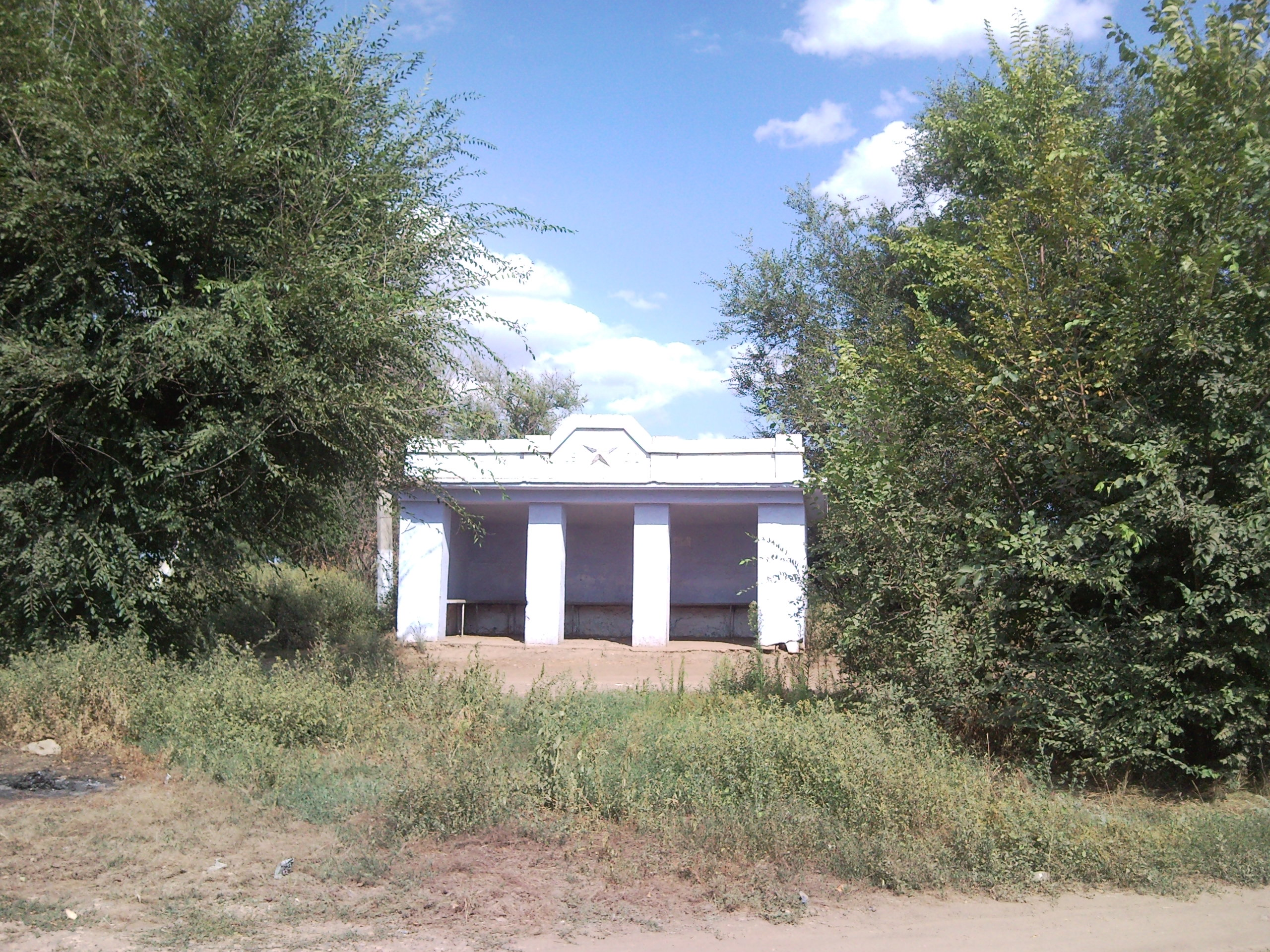 Дивізія Зупинка